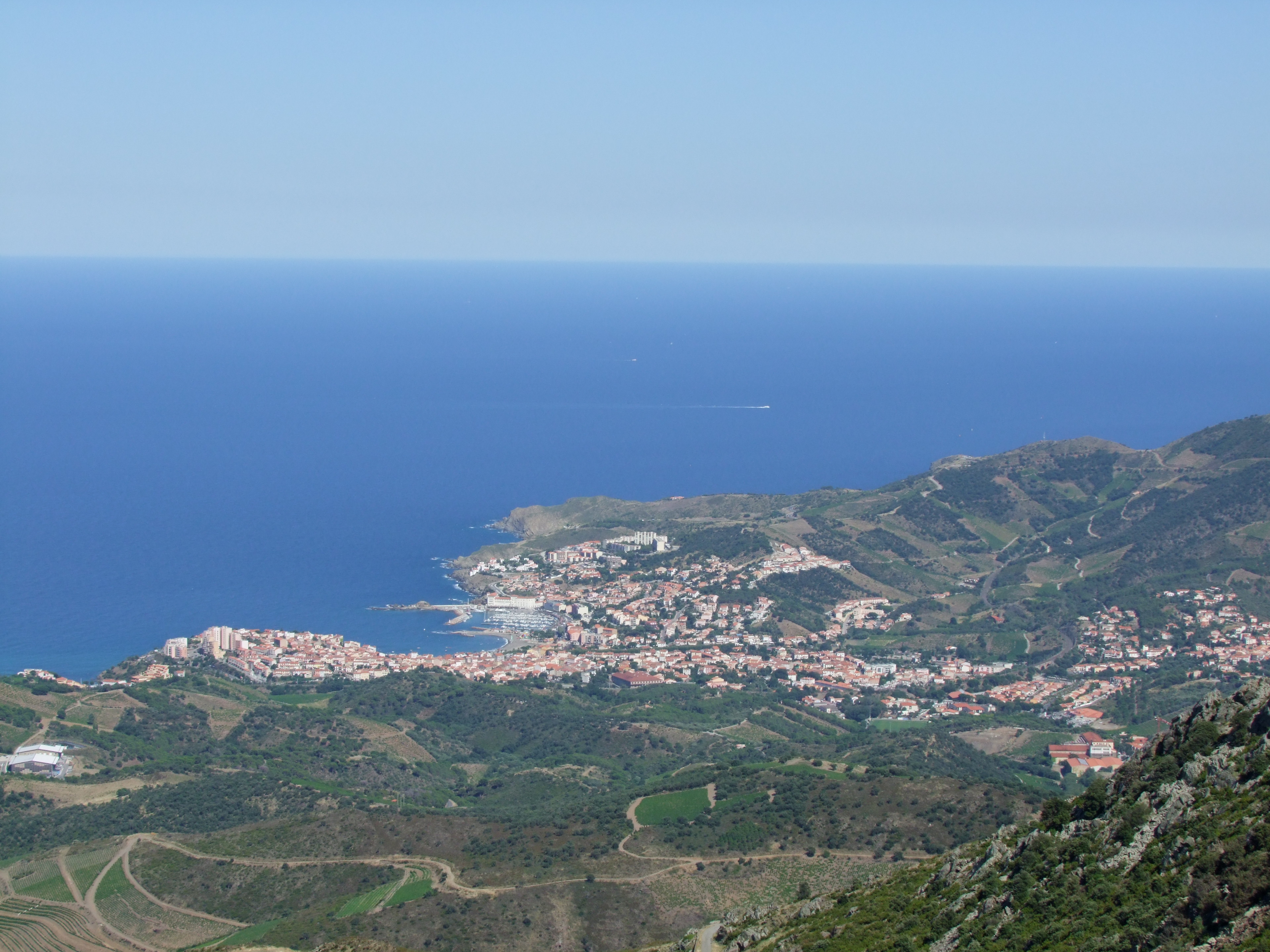 Banyuls sur mer, entre vignes et Méditerranée, depuis la tour Madeloc.